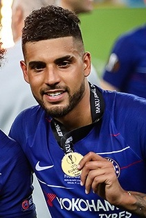 مسابقه چلسی و آرسنال، فینال لیگ اروپا ۲۰۱۹